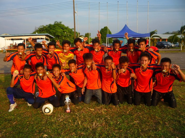 Pemain bola sepak SMKAI